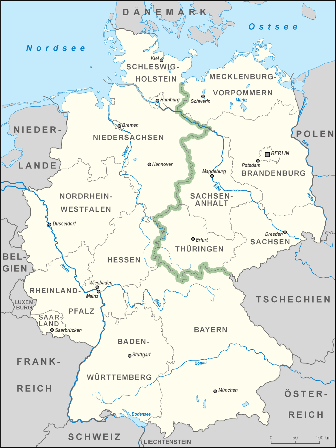 Karte des Grünen Bandes Deutschland